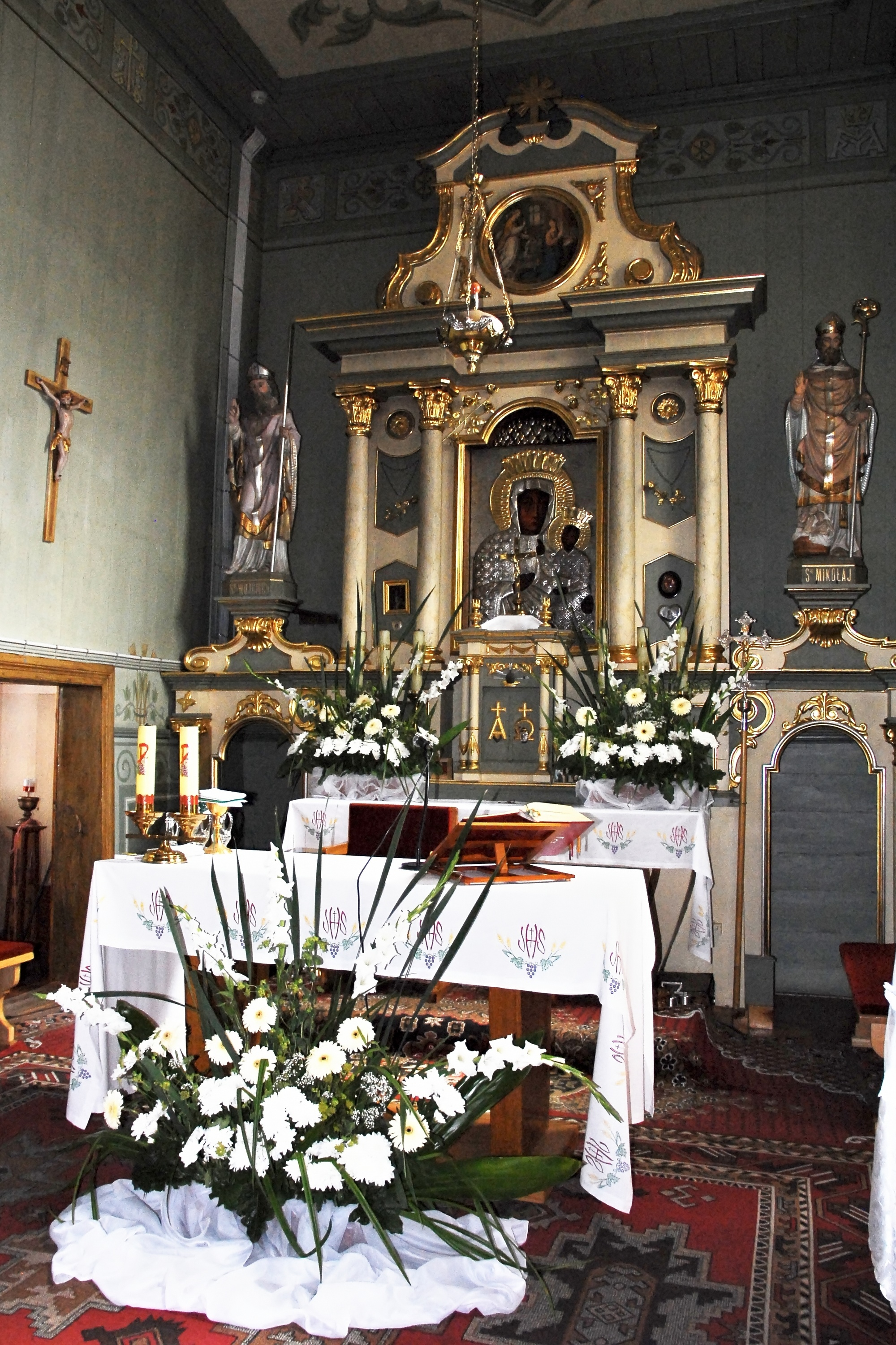 Szczutowo, ul. 3-go Maja 25 - rzymskokatolicki kościół parafialny p.w. św. Marii Magdaleny, drew, XVIII-XX (ołtarz)